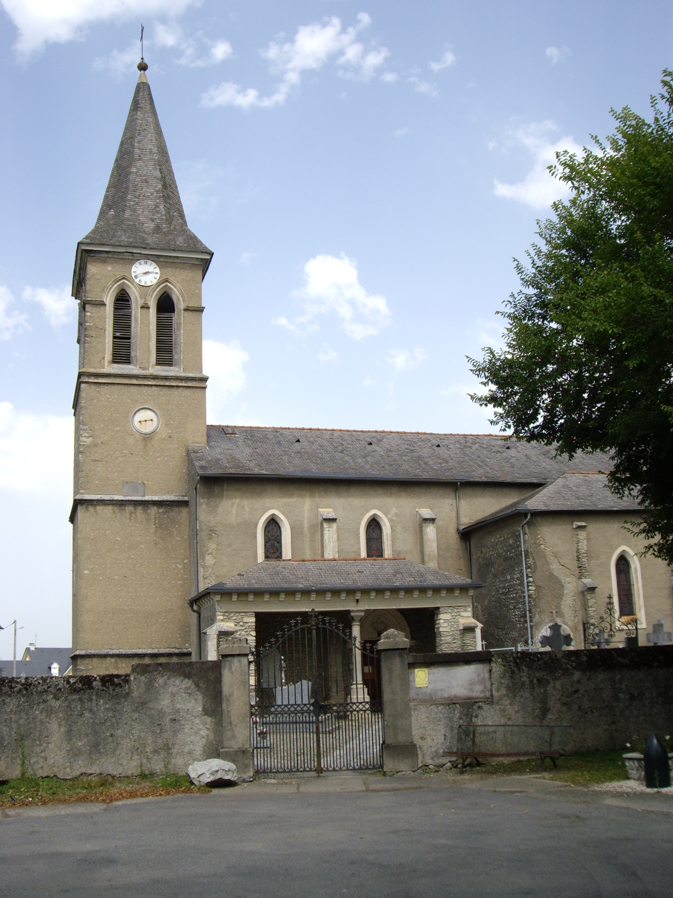 Église Saint-Mauront de Horgues (65)